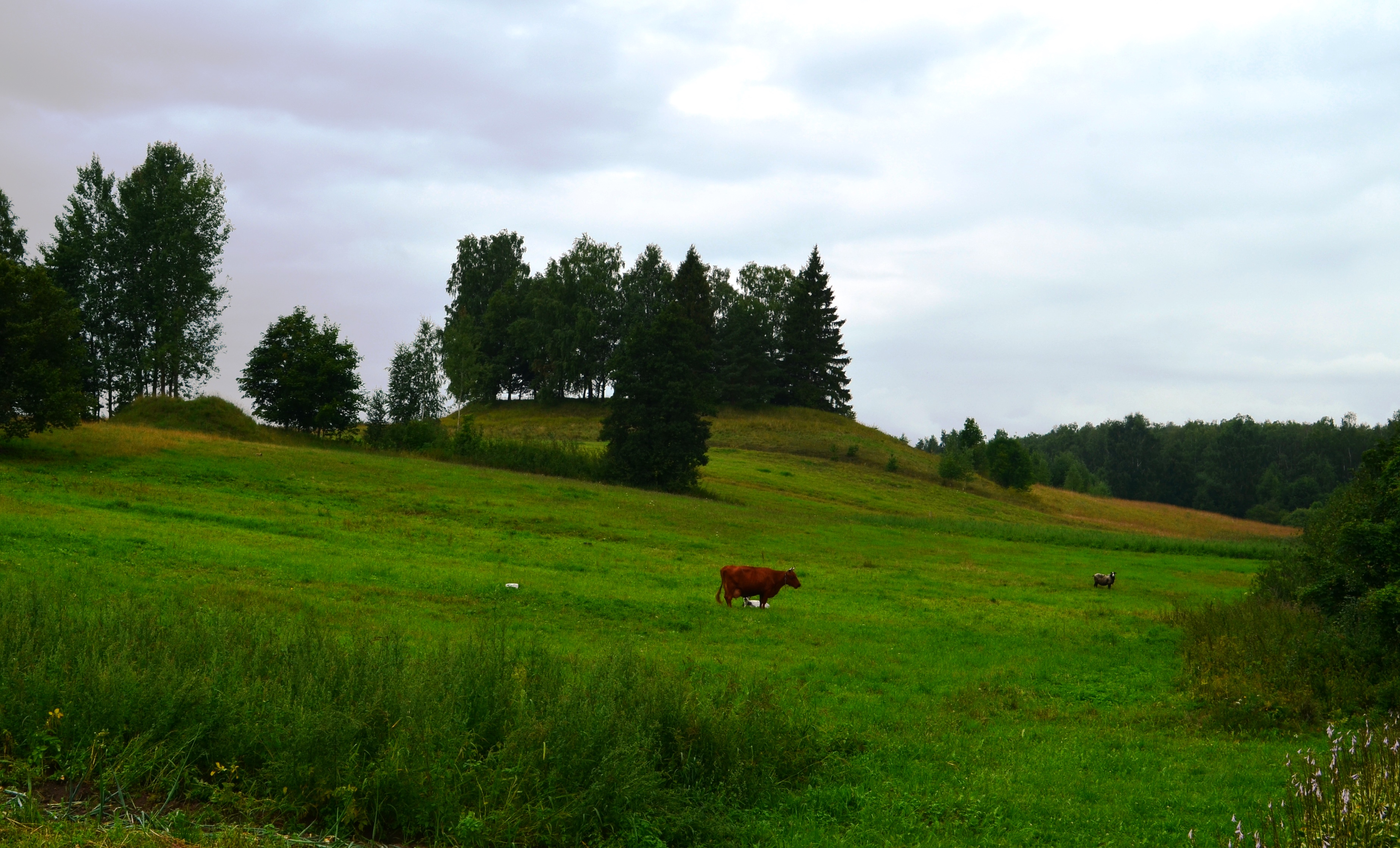 Petrešiūnų piliakalnis nuo kelio į Jūžintus, Rokiškio r.